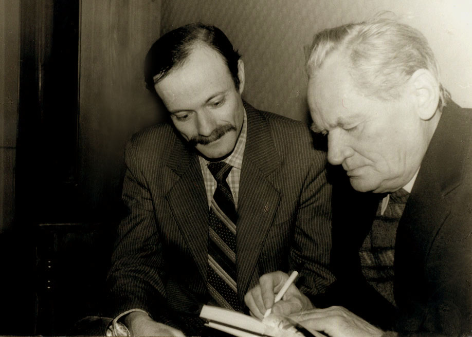 поэт Борис Чичибабин на творческой встрече в Харьковской организации Союза композиторов Украины